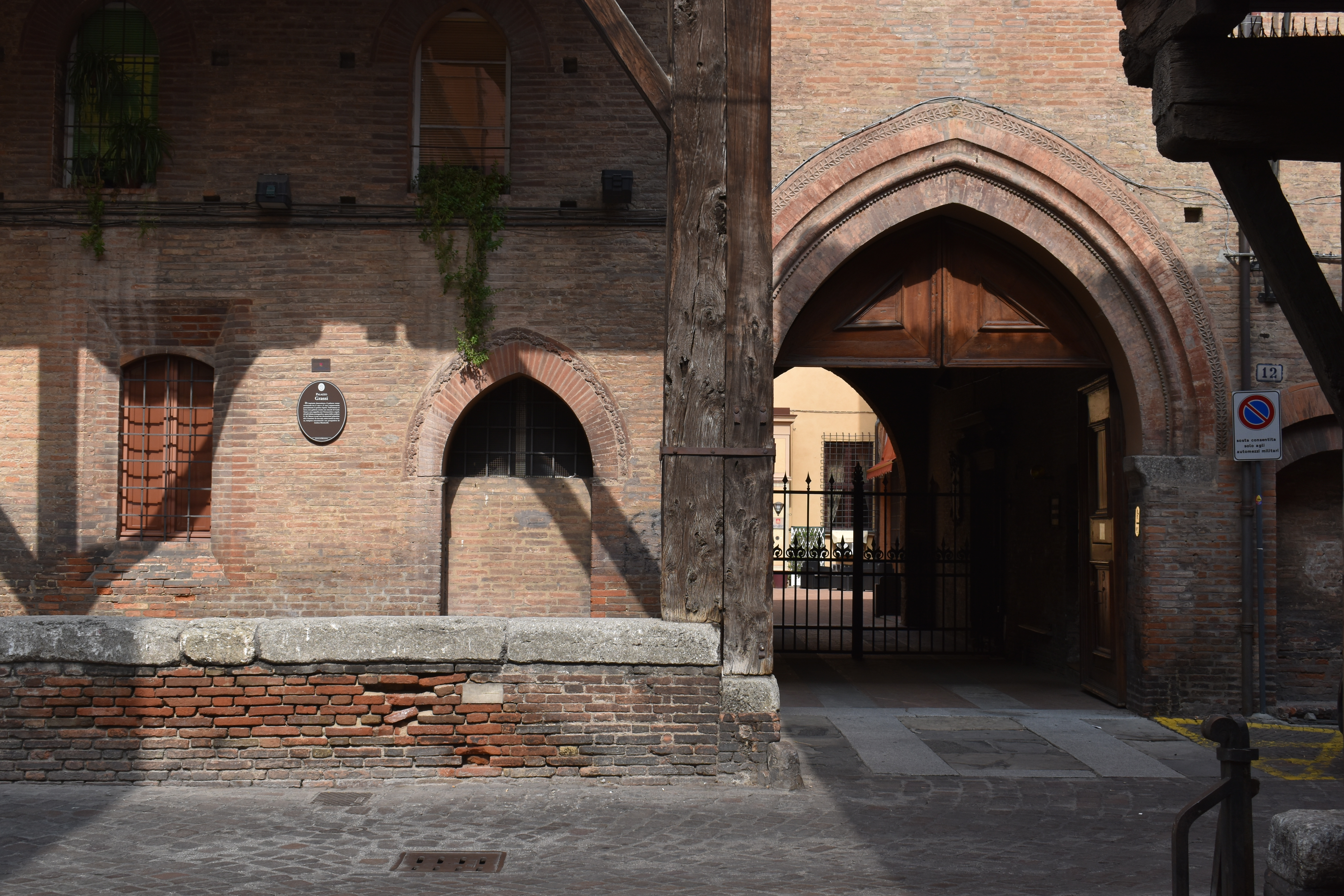 Portico Palazzo Grassi, particolare, Bologna This is a photo of a monument which is part of cultural heritage of Italy.